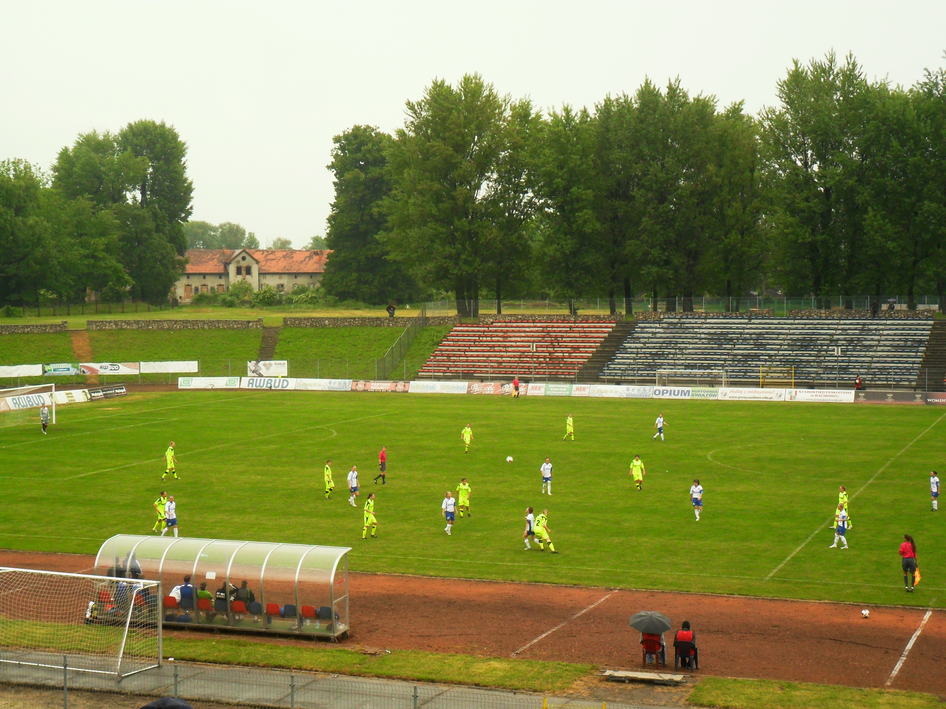 Mecz 17. kolejki Ekstraligi kobiet 28 maja 2011 RTP Unia Racibórz - AZS PSW Biała Podlaska (3:0)